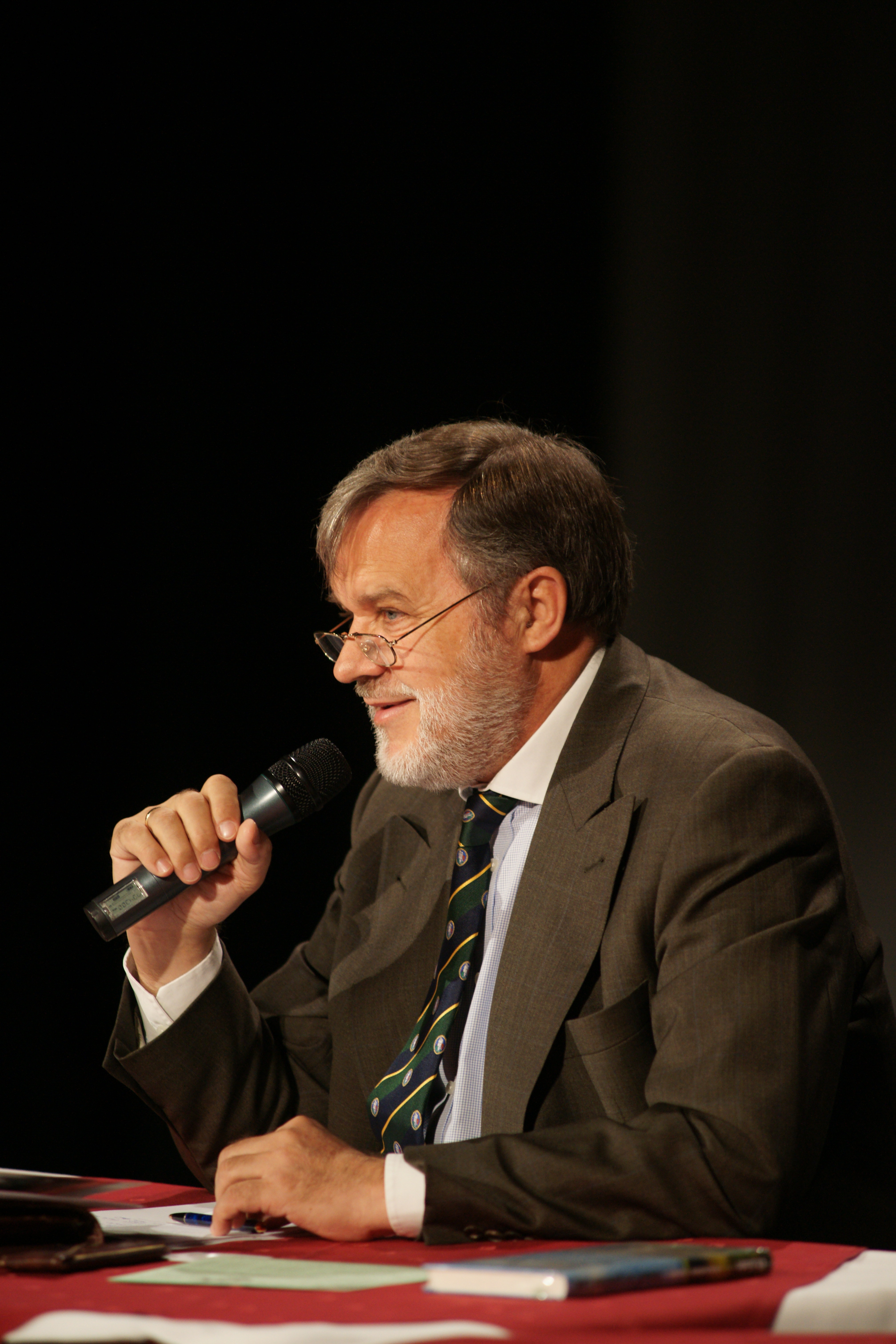 Jürgen Liminski, Alte Oper Erfurt, Verleihung des Matejcek-Preises (Familiennetzwerk) an Anna Zaborska und Petr Necas